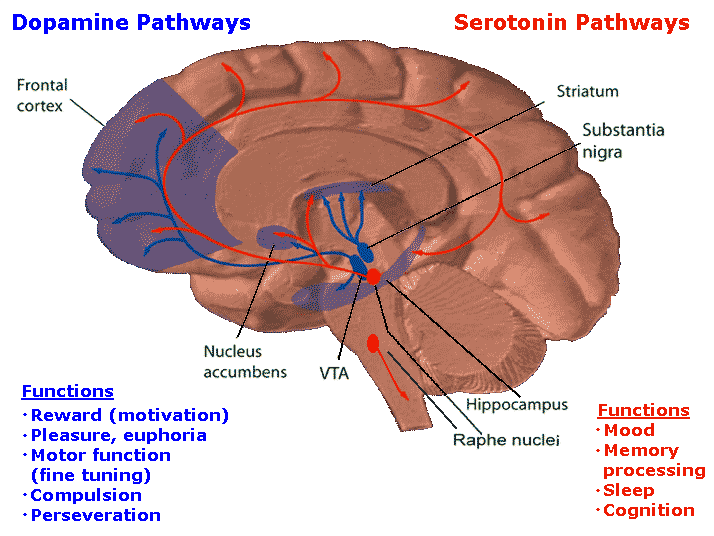 La serotonina también es necesaria para elaborar la melatonina (inductor del sueño) y es la encargada de la regulación del sueño. Los castigos emocionales al causar un daño o sufrimiento en el cuerpo por mas de dos o un dia pueden causar enfermedades como depresión o trastornos psicóticos (Esquizofrenia, bipolaridad, entre otras), trastornos relacionados a la tercera edad (demencias, trastornos del sueño, etc) Como regula nuestro estado de sueño/vigilia se convierte en el reloj particular de cada uno que coordina una serie de funciones biológicas como la temperatura corporal, la hormona del estrés (cortisol) y los ciclos del sueño. La correcta coordinación de estos cuatro elementos hace que podamos dormir profundamente y despertar descansados.. Como la producción de este neurotransmisor depende de la cantidad de luz recibida en otoño e invierno es normal que tengamos esa sensación de apatía que no ocurre en primavera o verano. Pero nos vamos a centrar en la parte relacionada con los trastornos mentales y el cerebro. Cambios en el nivel de esta sustancia se asocian con desequilibrios mentales como la esquizofrenia o el autismo infantil además según algunos estudios son gemelos indican que esta causa puede tener un origen genético y ser heredable.